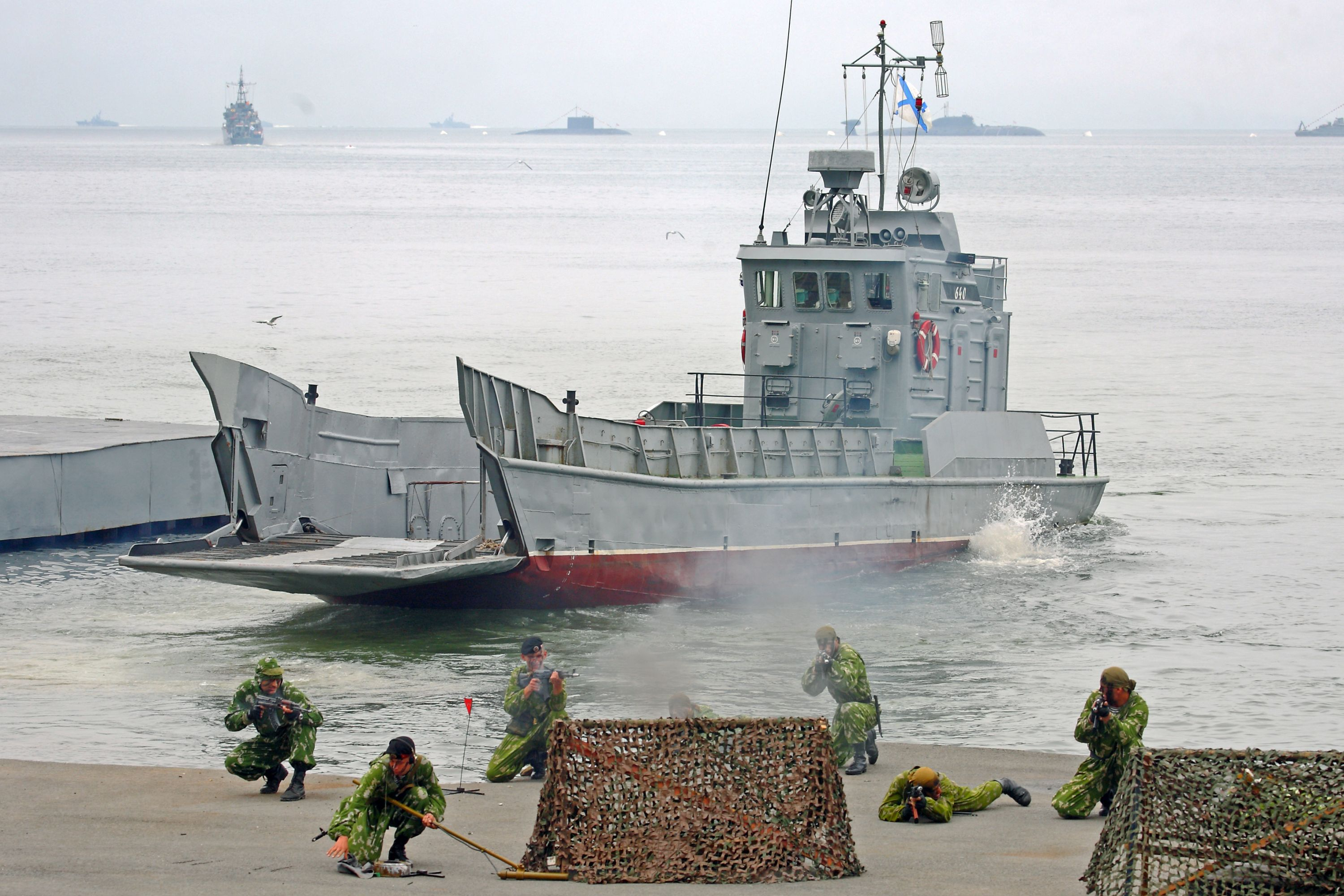 ДКА Д-704 в Амурском заливе 2010.07.25